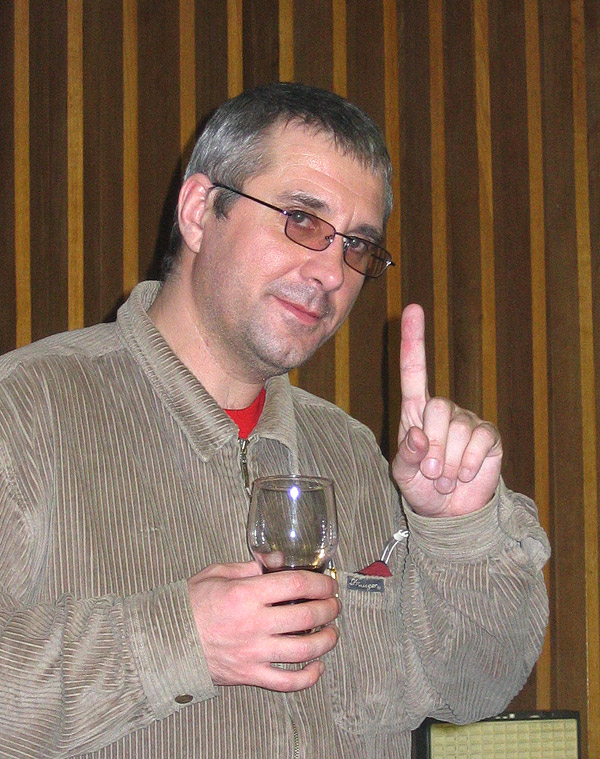 from ru wiki: Владимир "Воха" Васильев